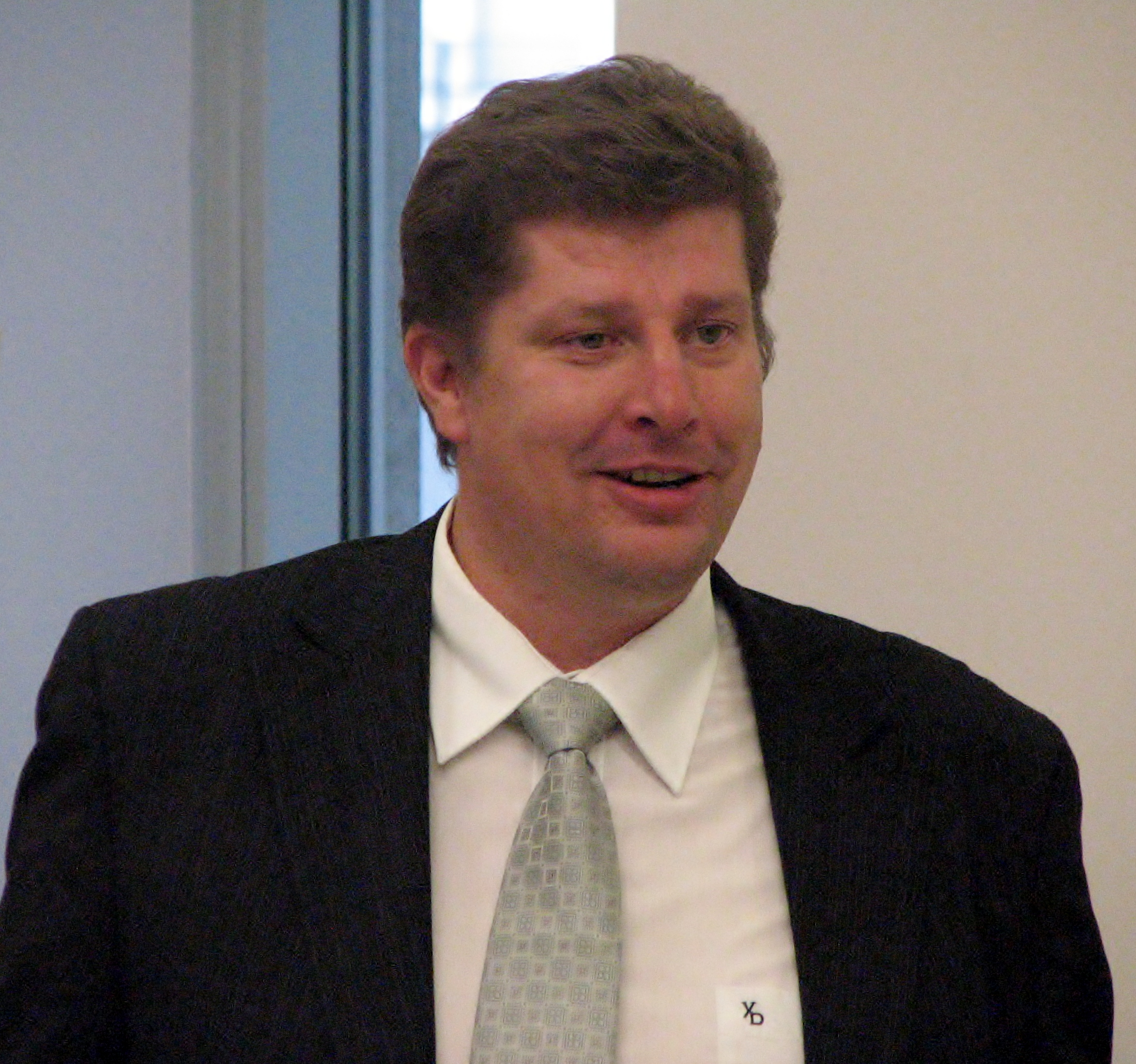 Hannes Palang Mihhail Lotmanile pühendatud sümpoosionil